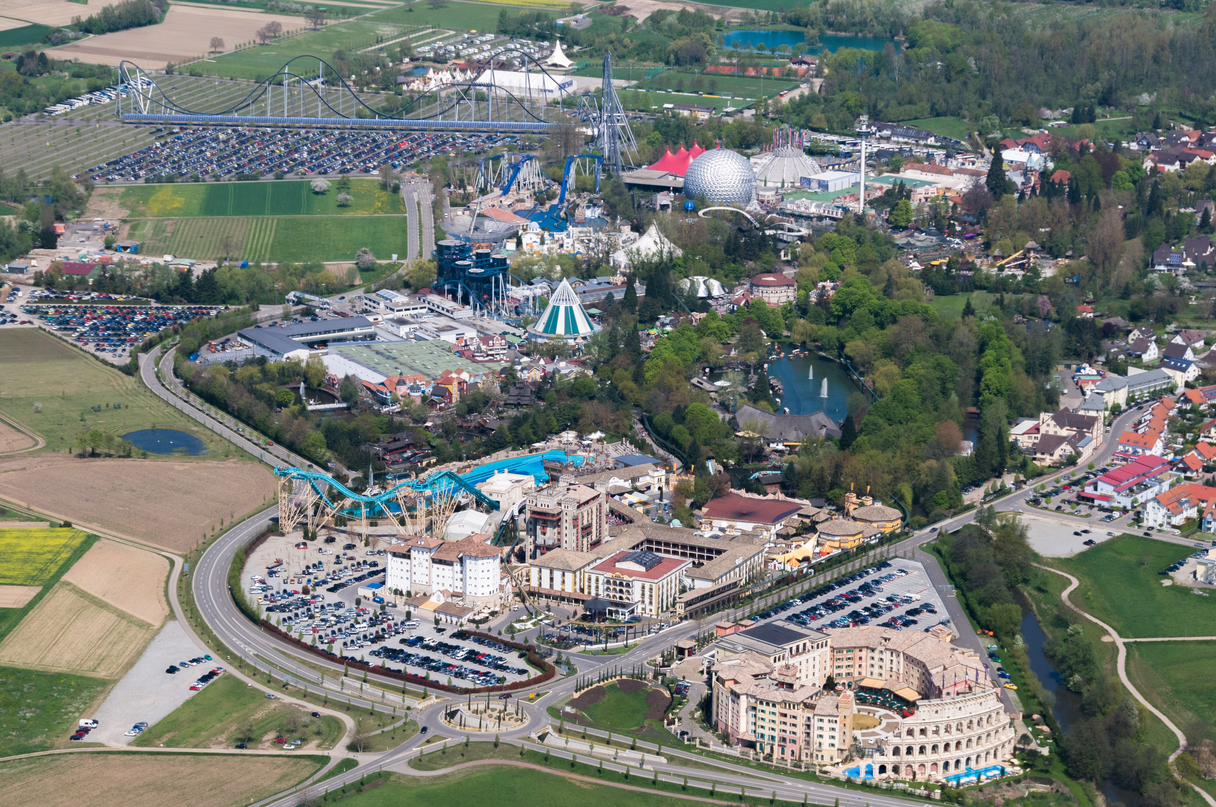 Aerial Picture Europapark